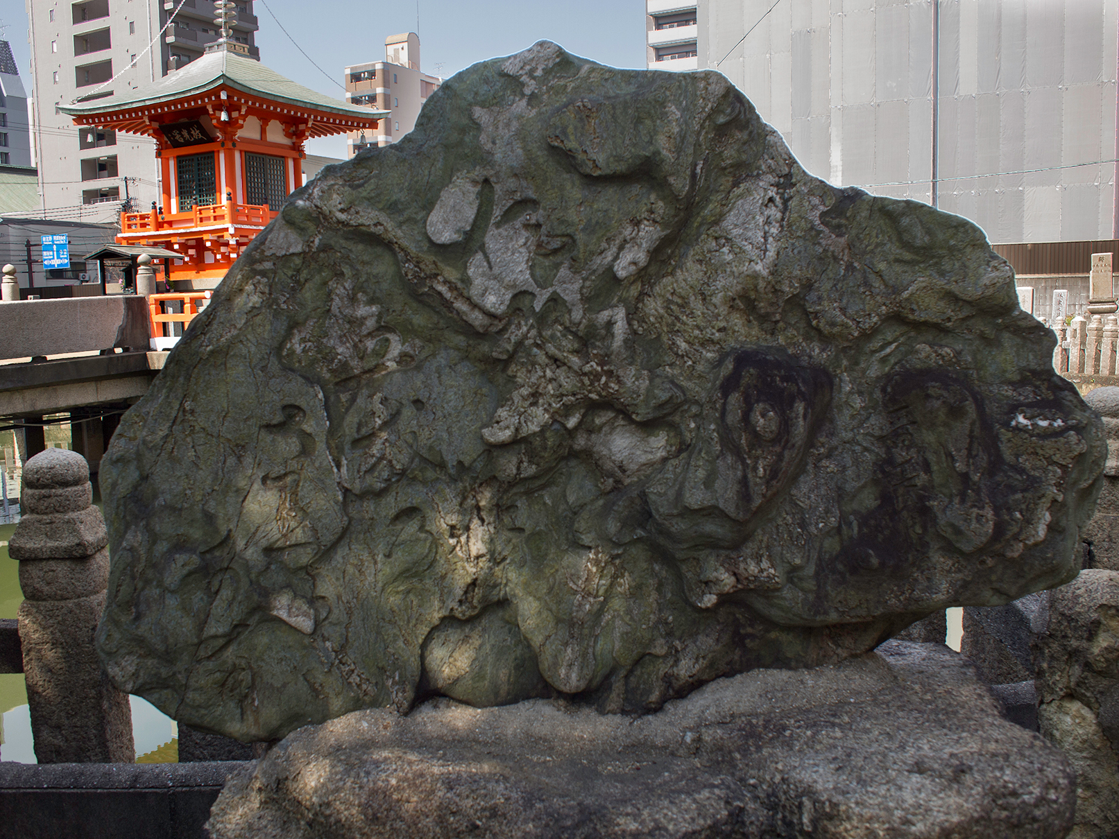 大阪和光寺其角句碑